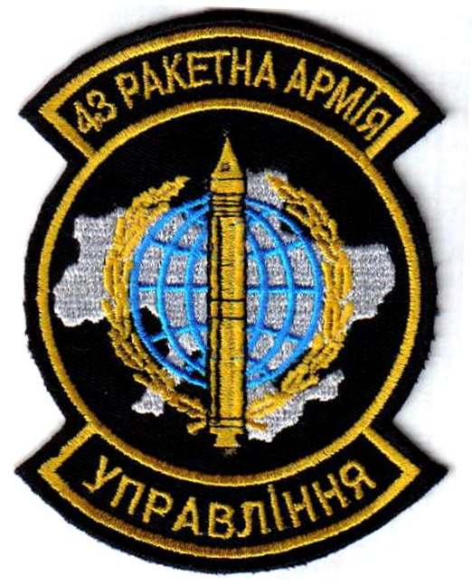 Шеврон военнослужащих управления 43-й ракетной армии Вооружённых сил Украины